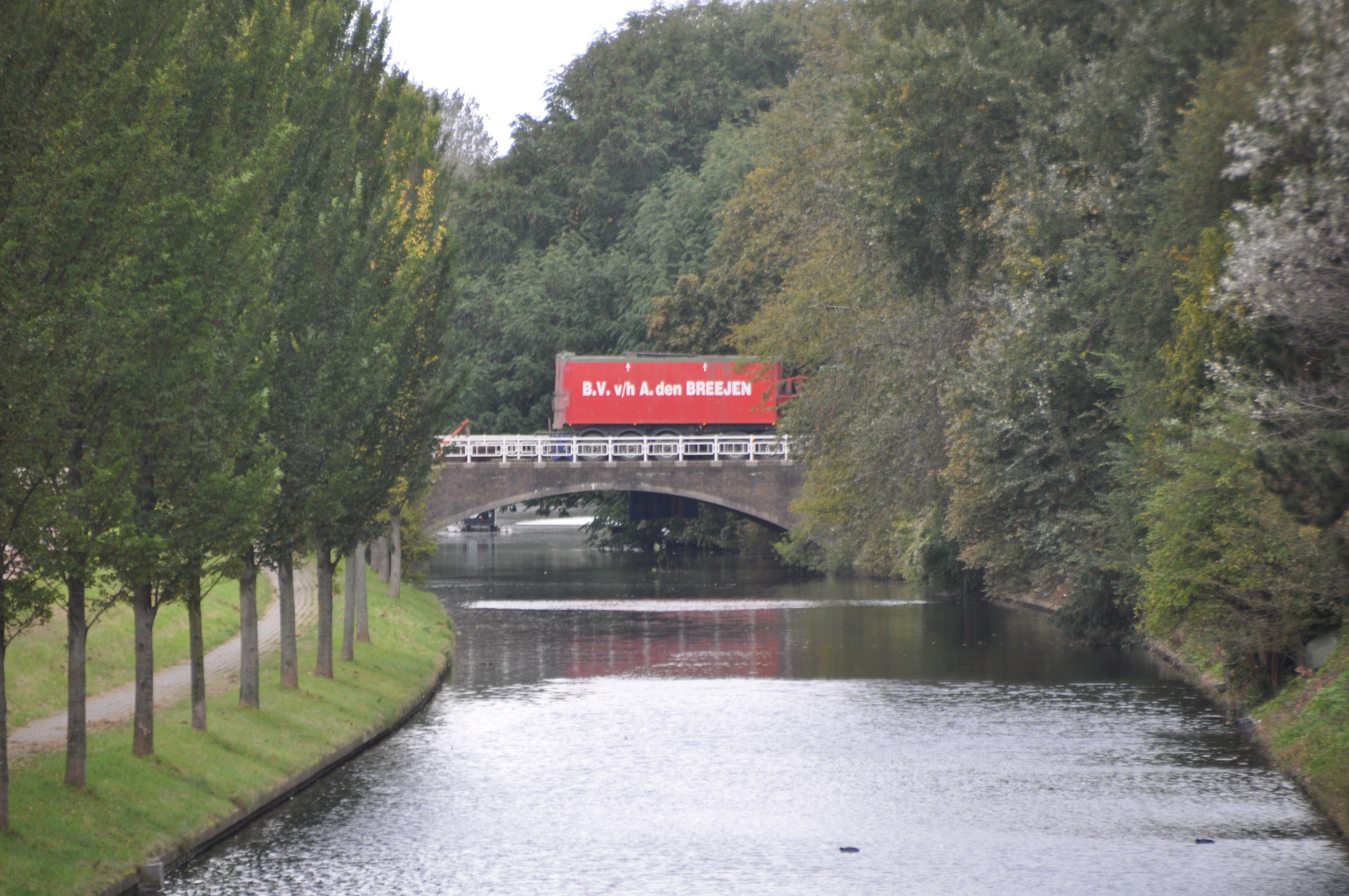 Bruggen in Den Haag.